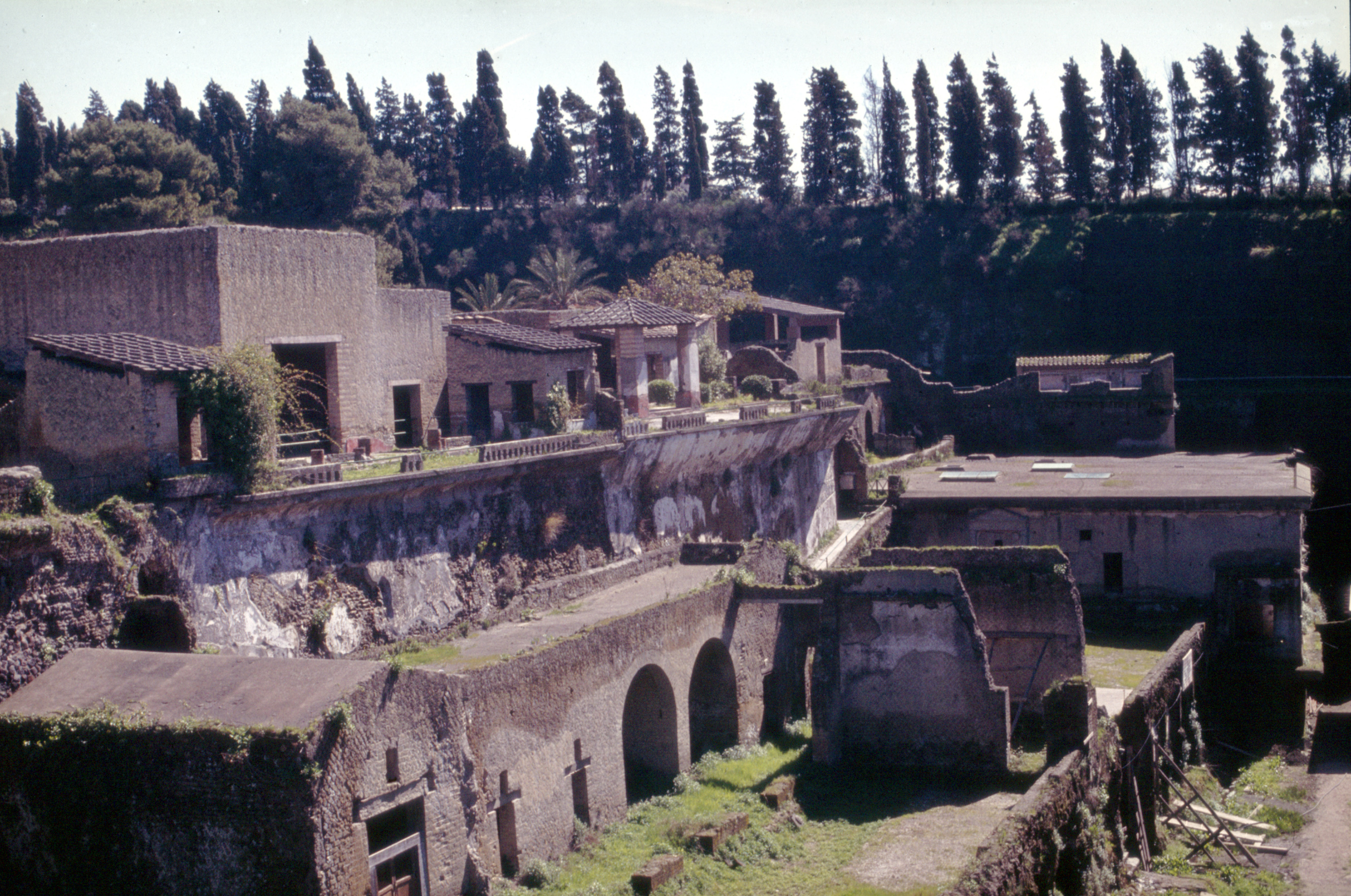 Herculaneum